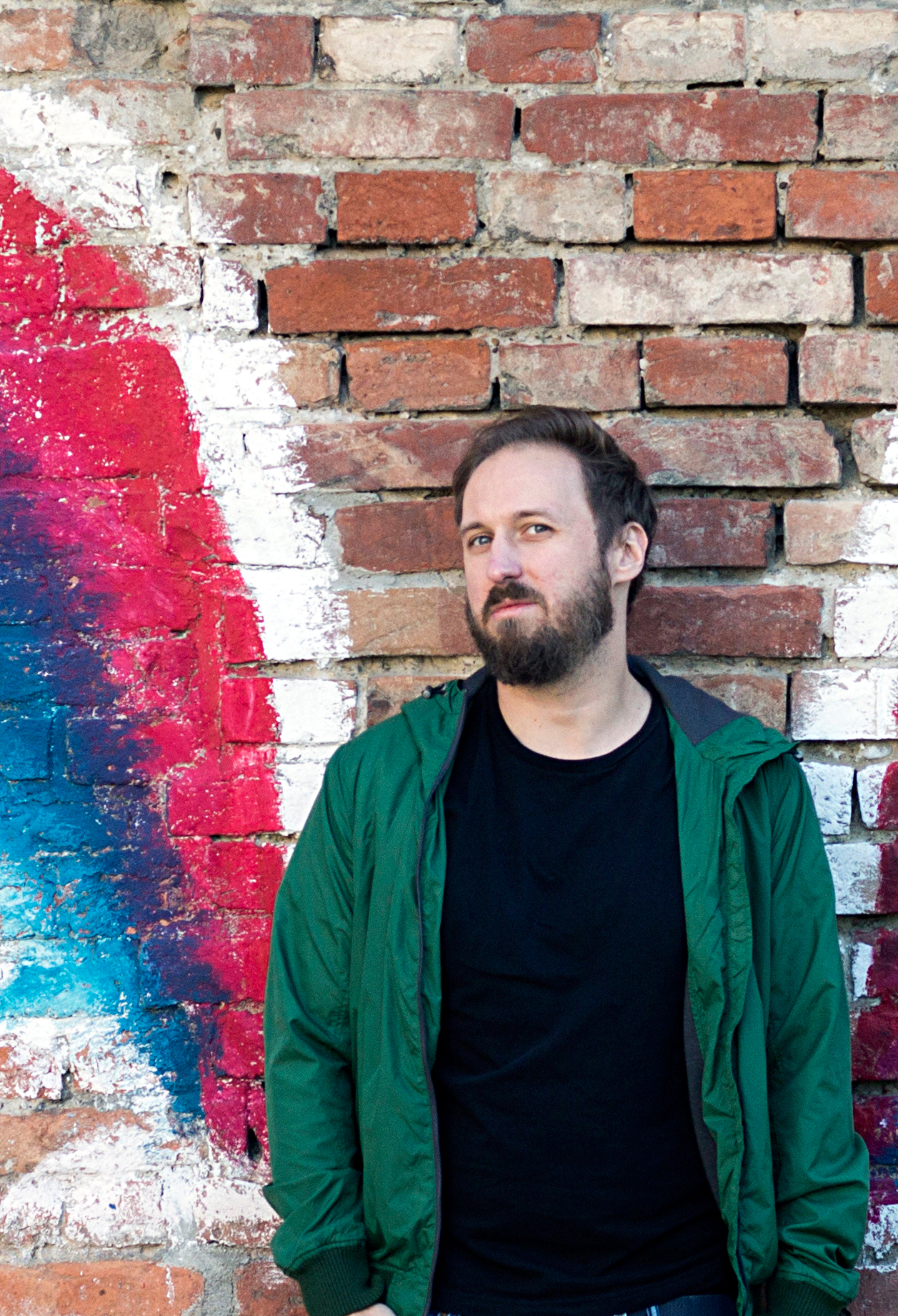 Porträtfoto Martin Peichl